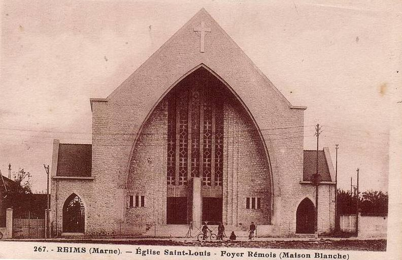 Eglise Saint Louis Reims